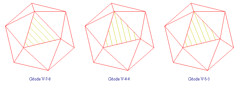 Géodes à base d'icosaèdre : étape 2 de la construction